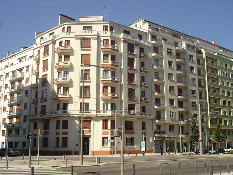 Boulevard Maréchal Foch à Grenoble (intersection avec la rue Marceau) - photo à 0,2 Mo